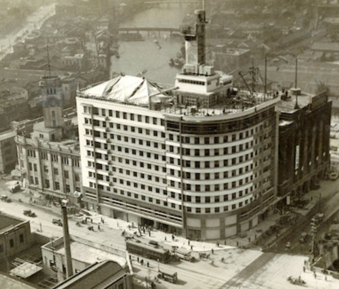 1931年に撮影された大阪朝日ビルの外観。朝日新聞デジタル「中之島フェスティバルタワーフォトギャラリー」より。